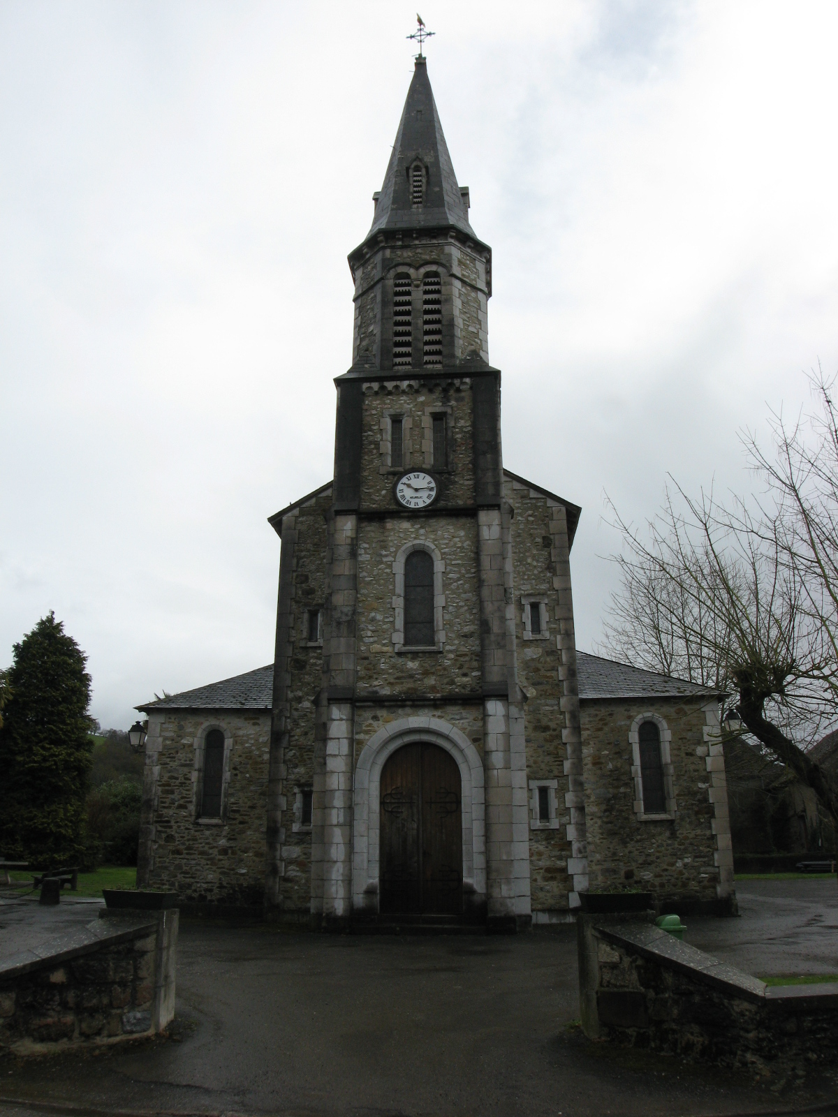 Eglise de Laas (Pyrénées-Atlantiques) (Pyrénées).